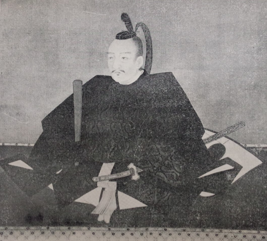 本多康紀の肖像。